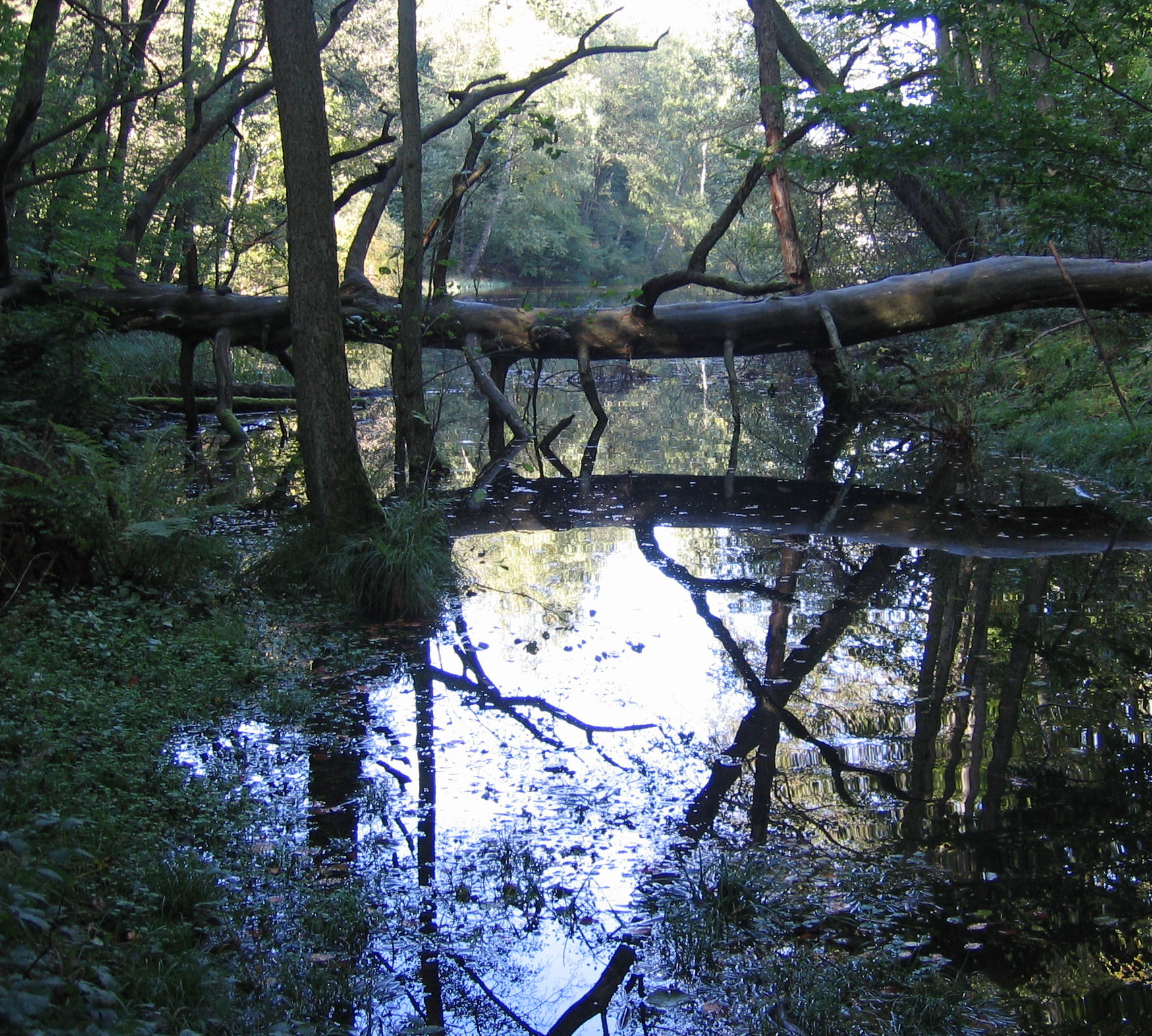 lake in Donnersbergkreis, Germany